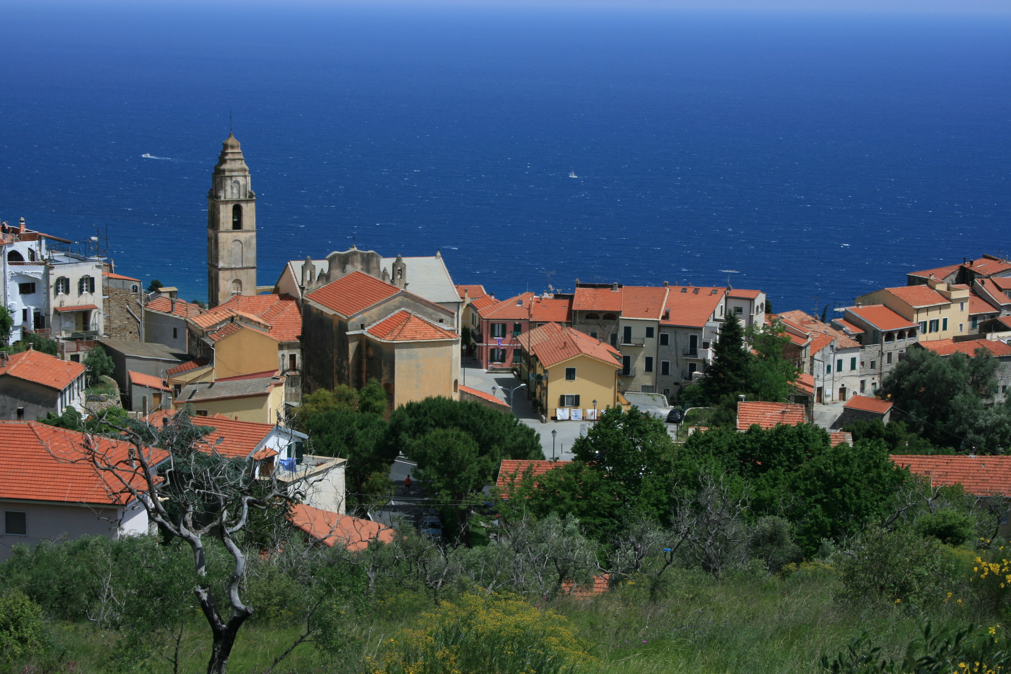 Cipressa (IM). june 2008